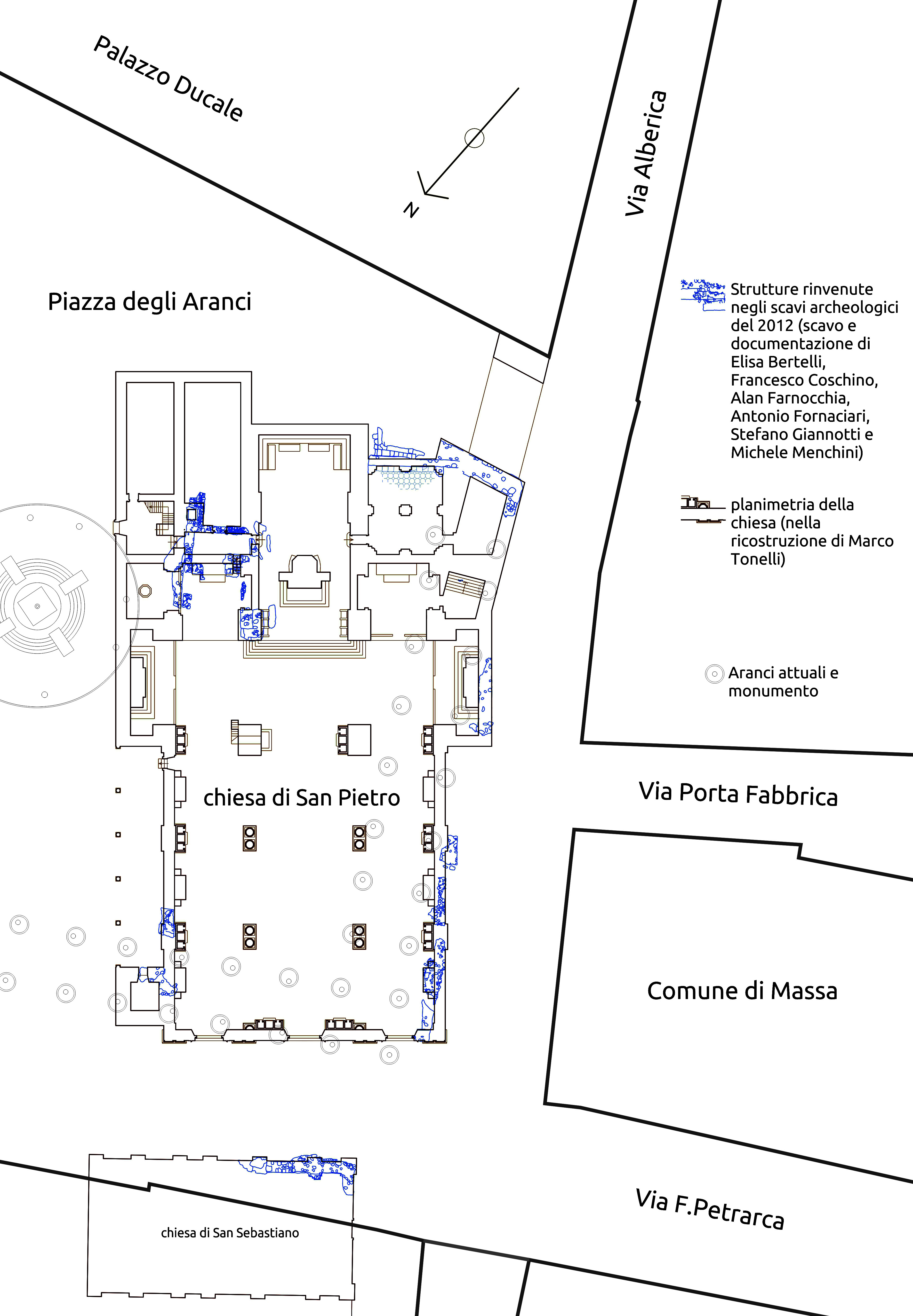 Planimetria della Chiesa Collegiata di San Pietro di Massa nella ricostruzione di Marco Tonelli con sovrapposti gli scavi eseguiti dalla Soprintendenza di Pisa e gli edifici esistenti